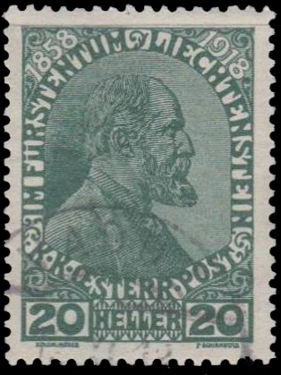 Первая коммеморативная марка Лихтенштейна, к 60-летию правления князя Иоганна II